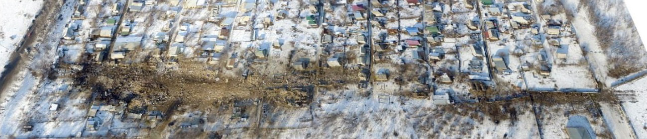 Turkish Airlines Flight 6491 debris area (bird's eye view)